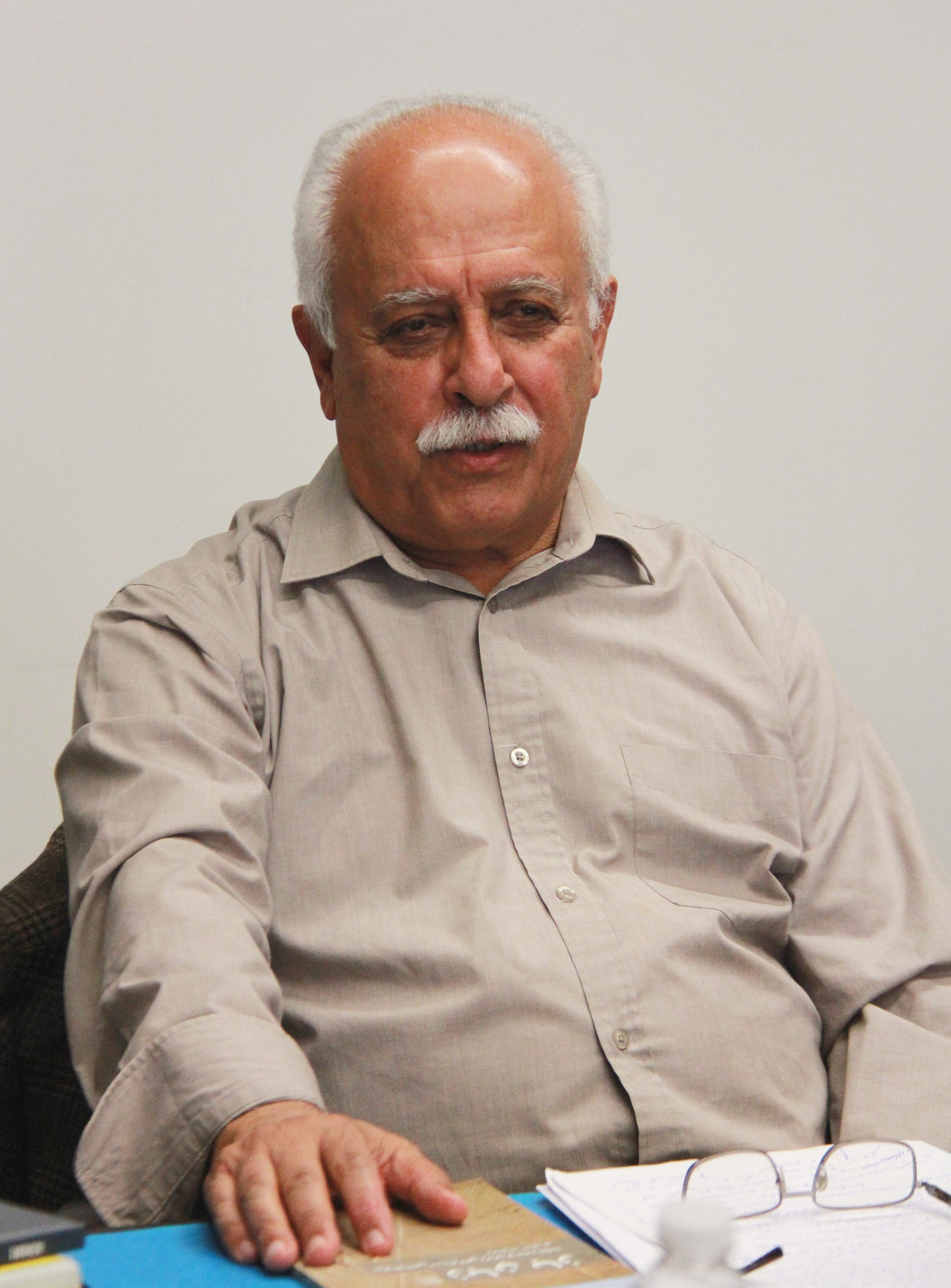 کارگاه زبان فارسی داریوش آشوری در نیویورک